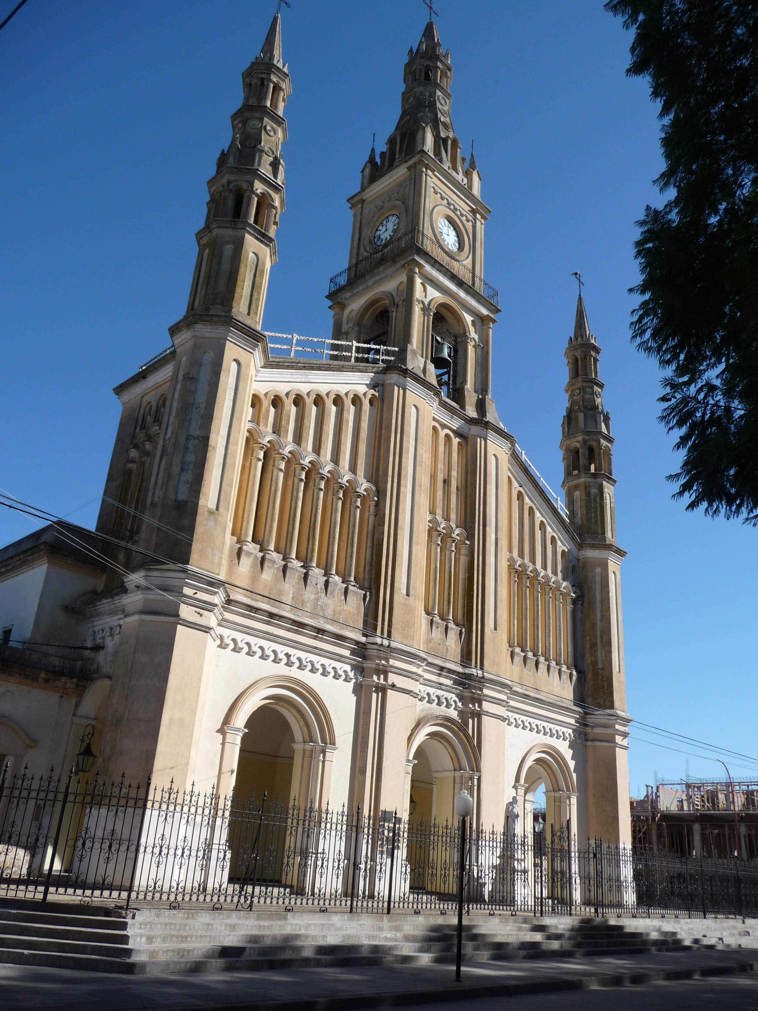 Fachada de la iglesia de San Antonio en Gualeguay, provincia de Entre Ríos, Argentina.